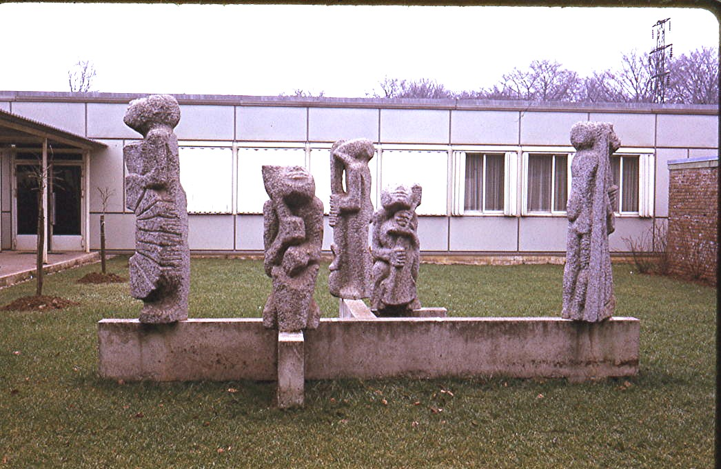 Groupe de cinq musiciens de Shelomo Selinger, Granit sculpté en 1969